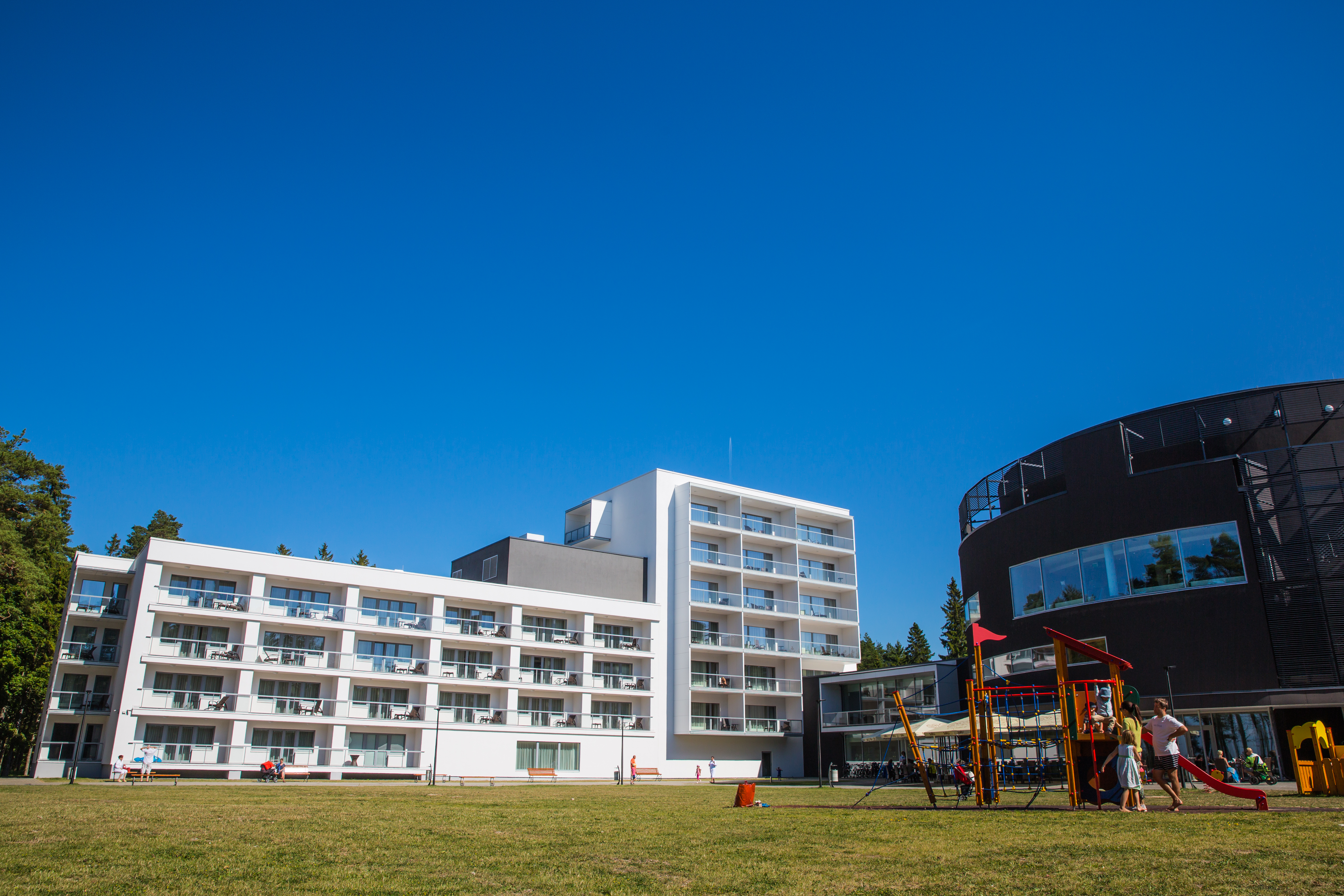 Noorus SPA Hotel возведённый в 2014 году на месте Международного туристического центра ”Ноорус-Спутник”.